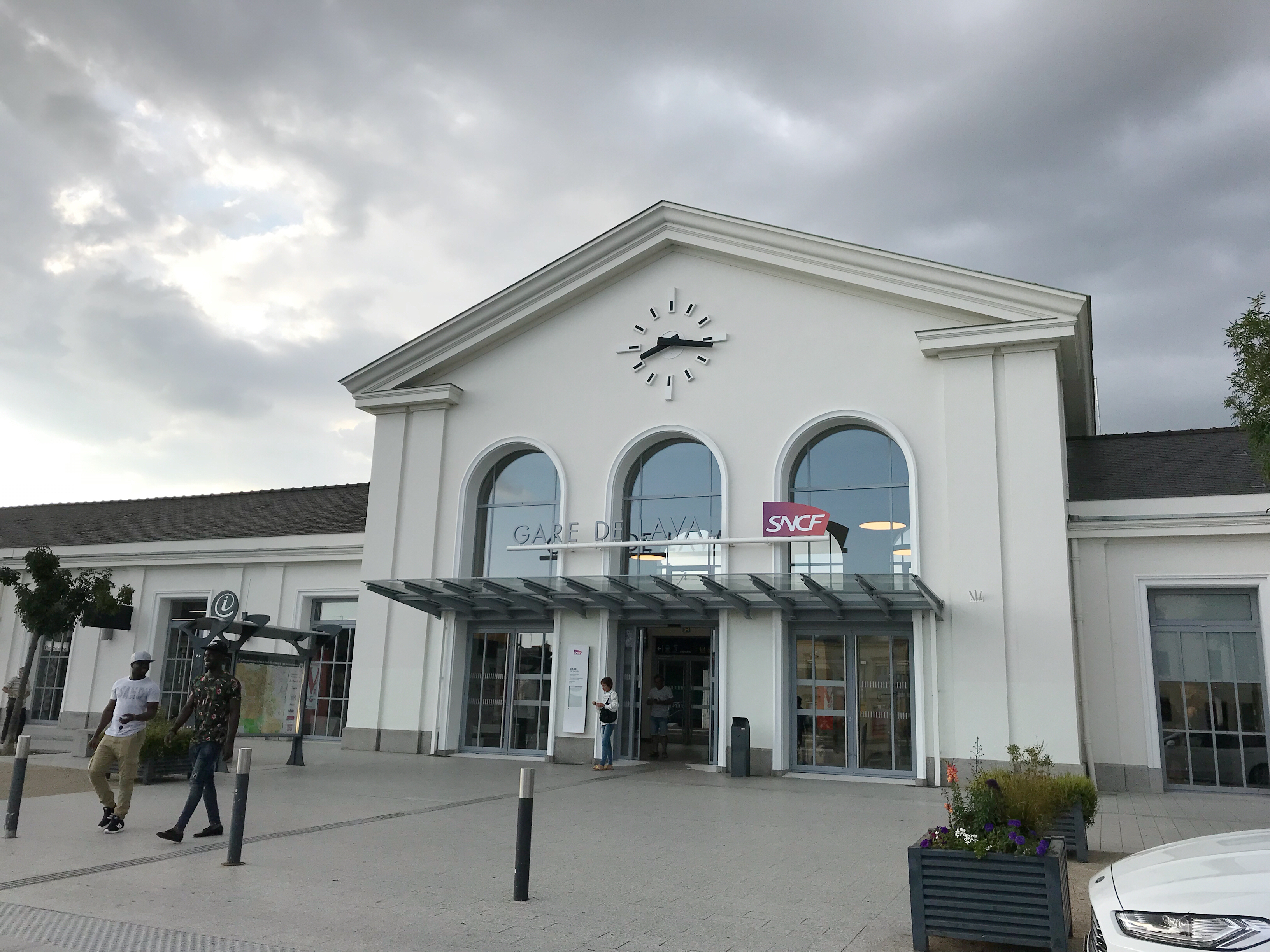 La gare de Laval (53) en 2018